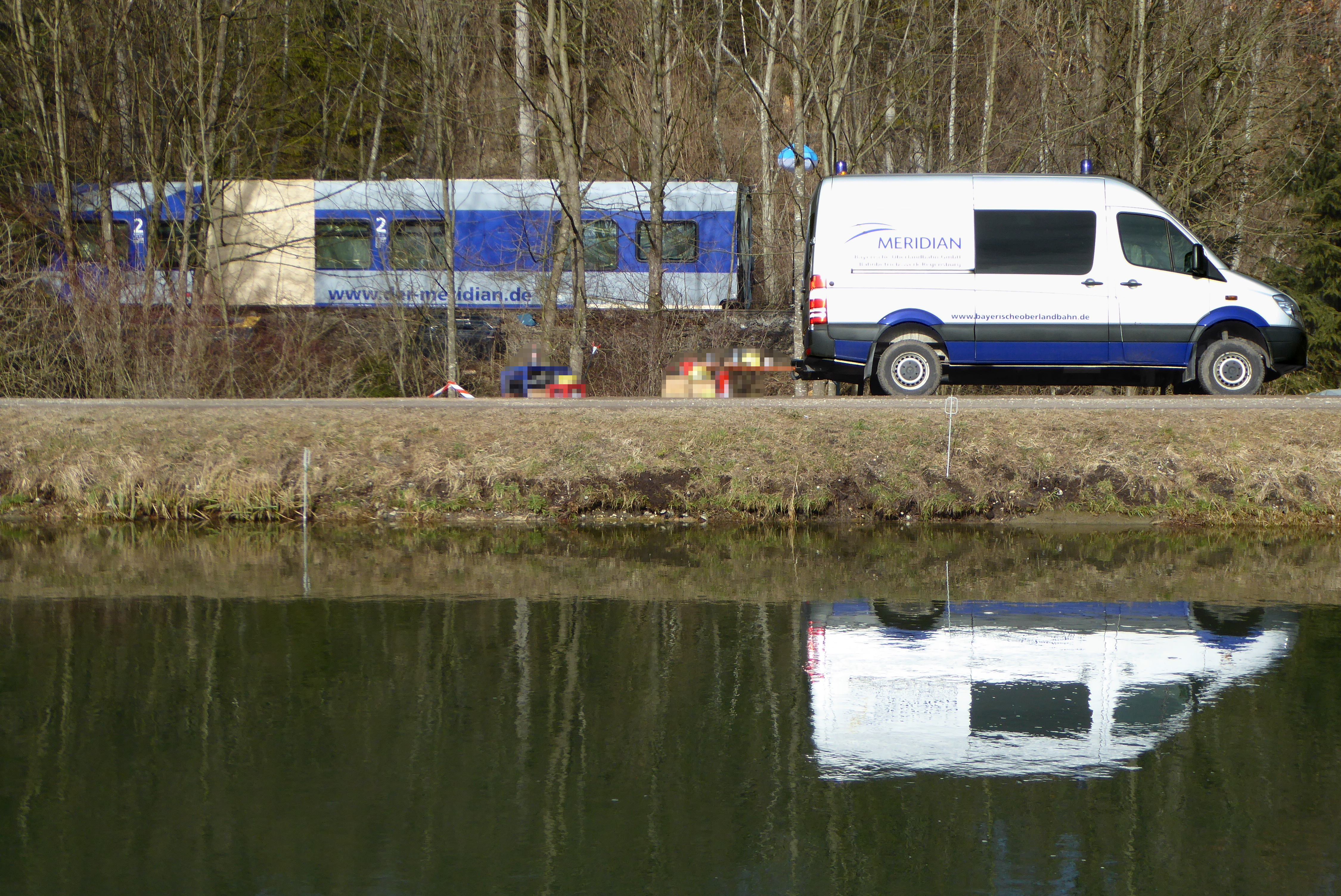 Ein Wagen der am 2016-02-09 verunglückten Meridianzüge an der Unfallstelle westlich von Kolbermoor, daneben ein Einsatzfahrzeug des Meridian. Der Wagen steht neben den Schienen und kann erst abtransportiert werden, wenn sie repariert sind.